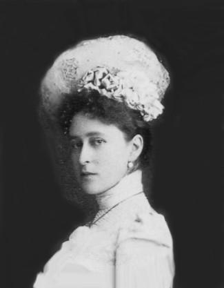 Elisaveta Feodorovna